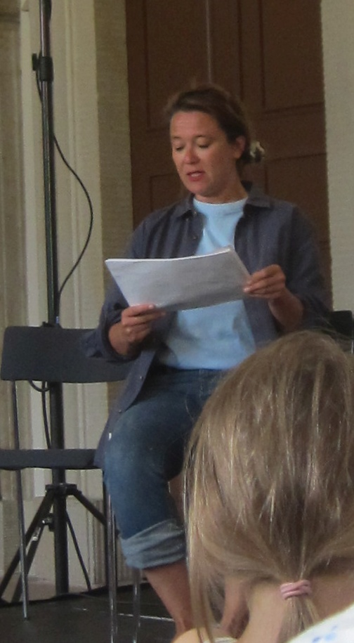 Anna-Katharina Muck liest im Palais im Großen Garten in Dresden aus „Mio, mein Mio“